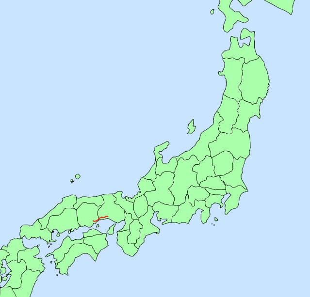 Carte de la ligne JR Kobe.